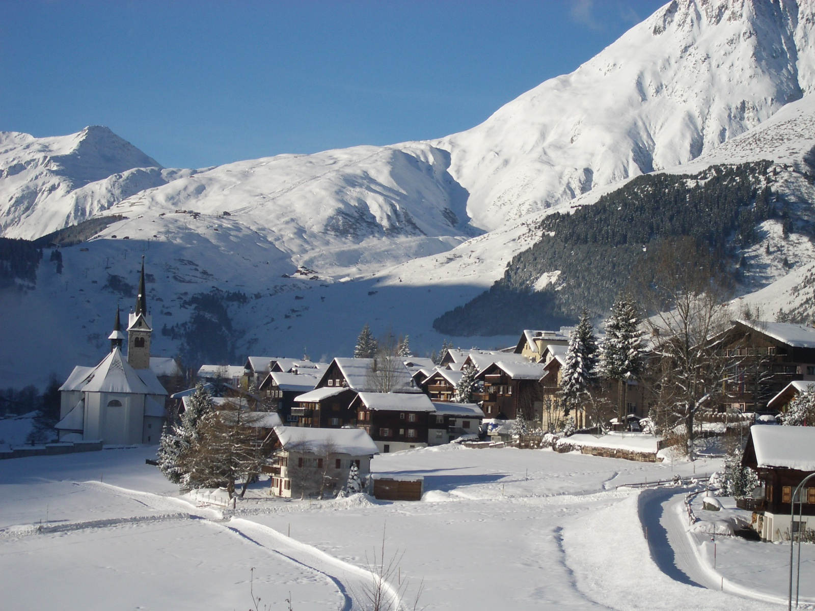 Sedrun, Switzerland self-made, December 2005